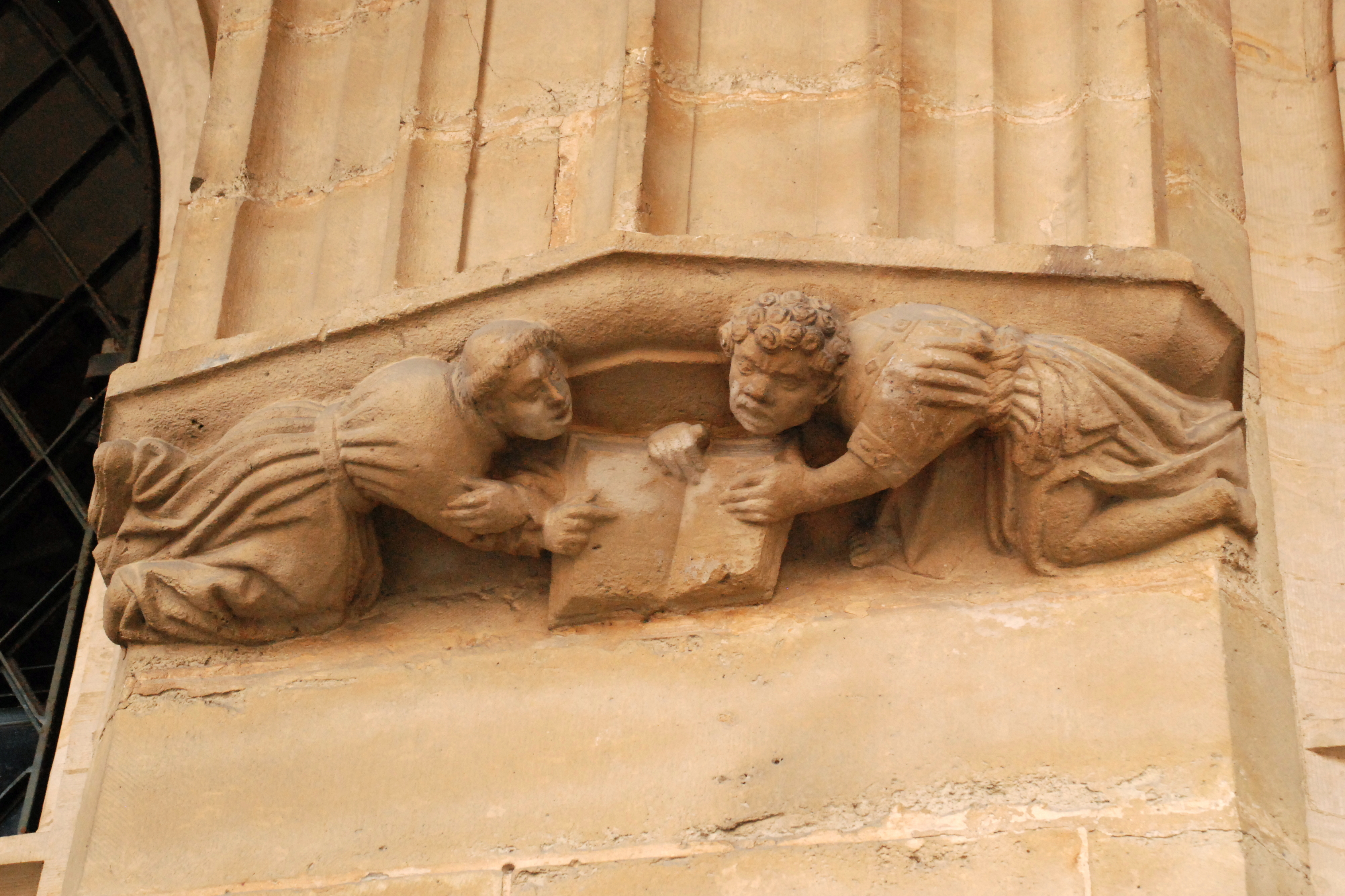 Belgique - Bruxelles - Grand-Place - Maison du Maure